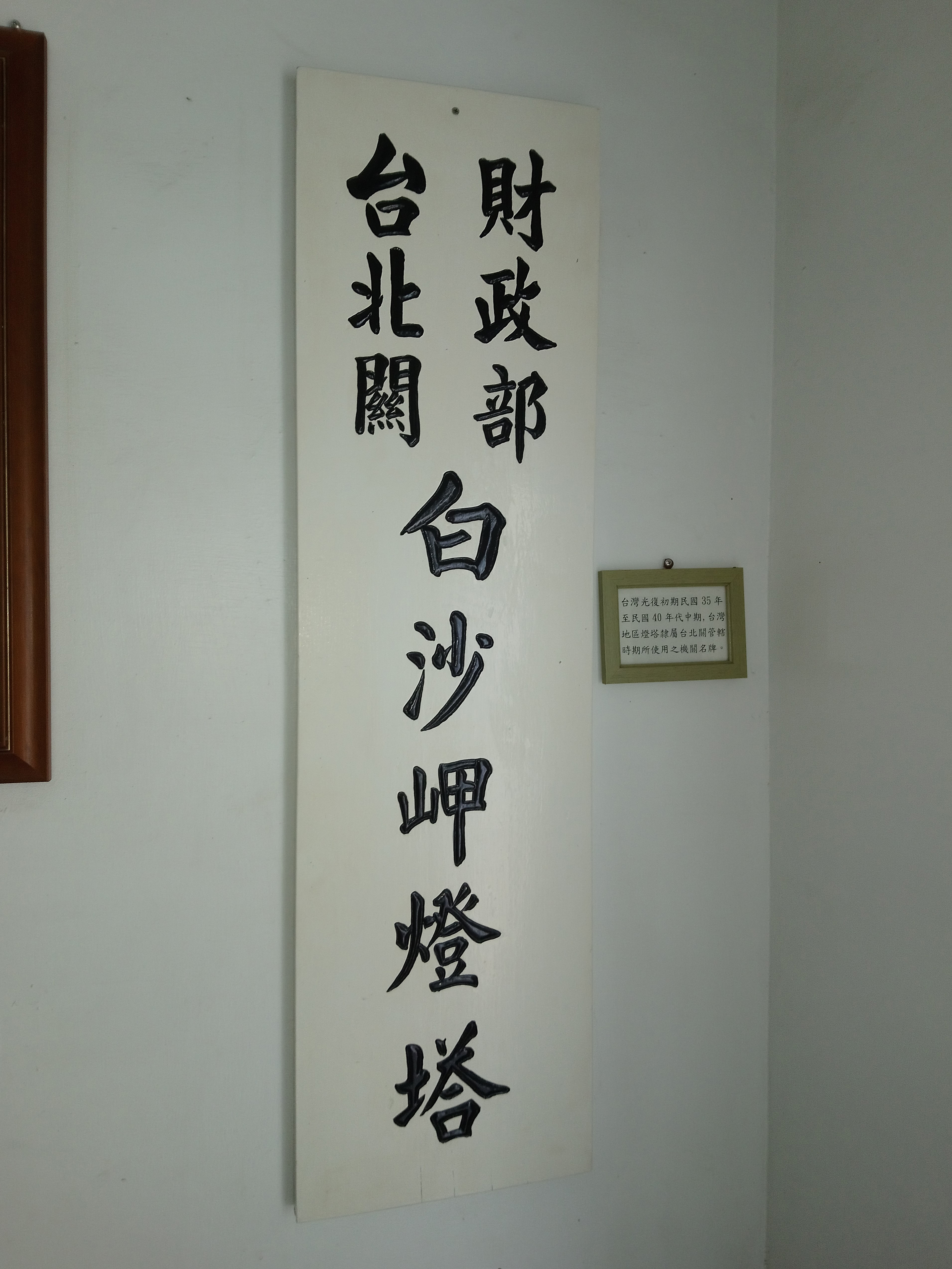 財政部臺北關白沙岬燈塔名牌,桃園市觀音區觀音地區觀音里